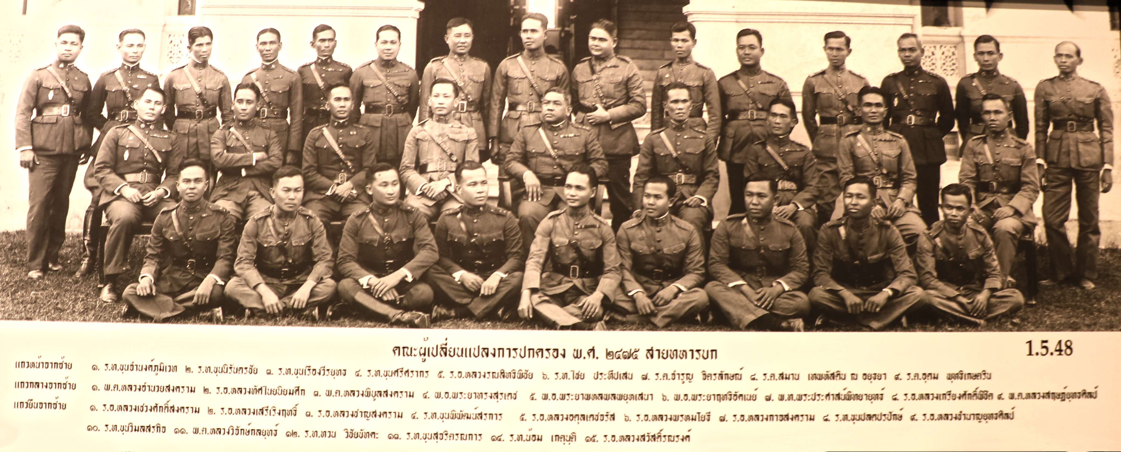 คณะราษฎรสายทหารบก